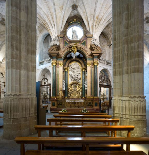 Transparente, de Ventura Rodríguez, a la catedral de Cuenca, con las reliquias de San Julián de Cuenca.